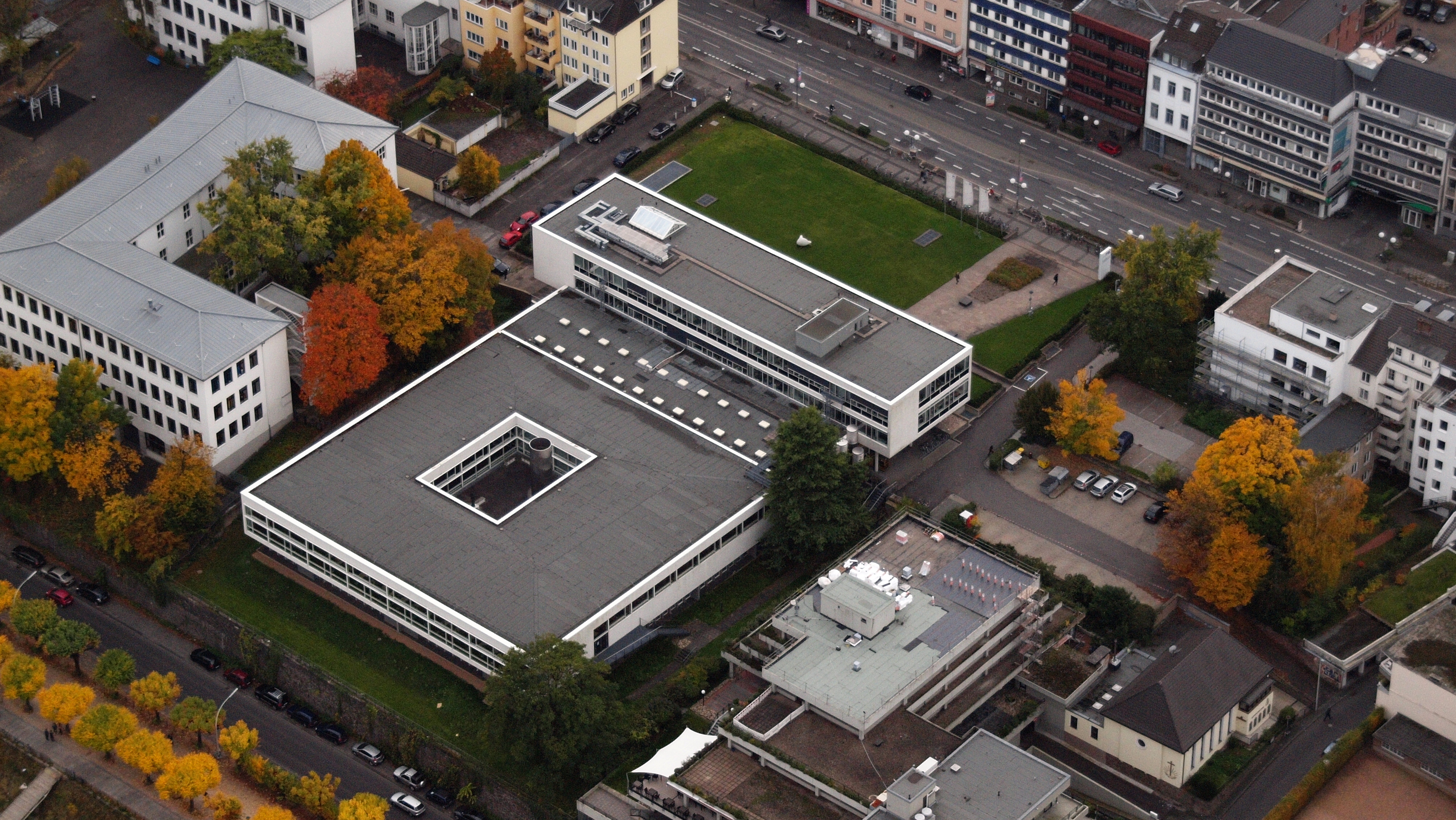 Universitäts- und Landesbibliothek Bonn, Adenauerallee 39–41, Bonn-Südstadt: Luftaufnahme (2015)